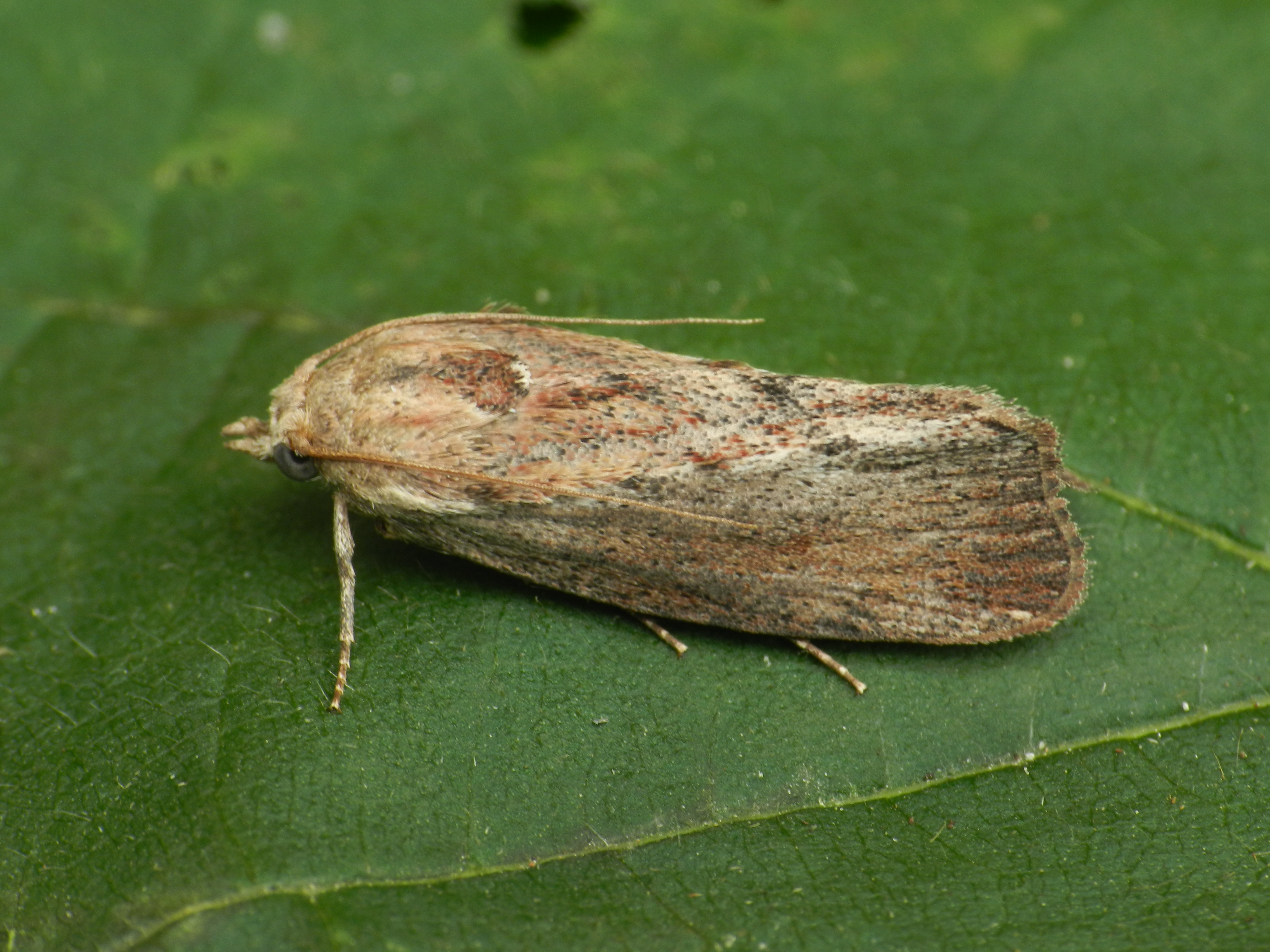 Galleria mellonella. Picture taken in Olsztyn, Poland.